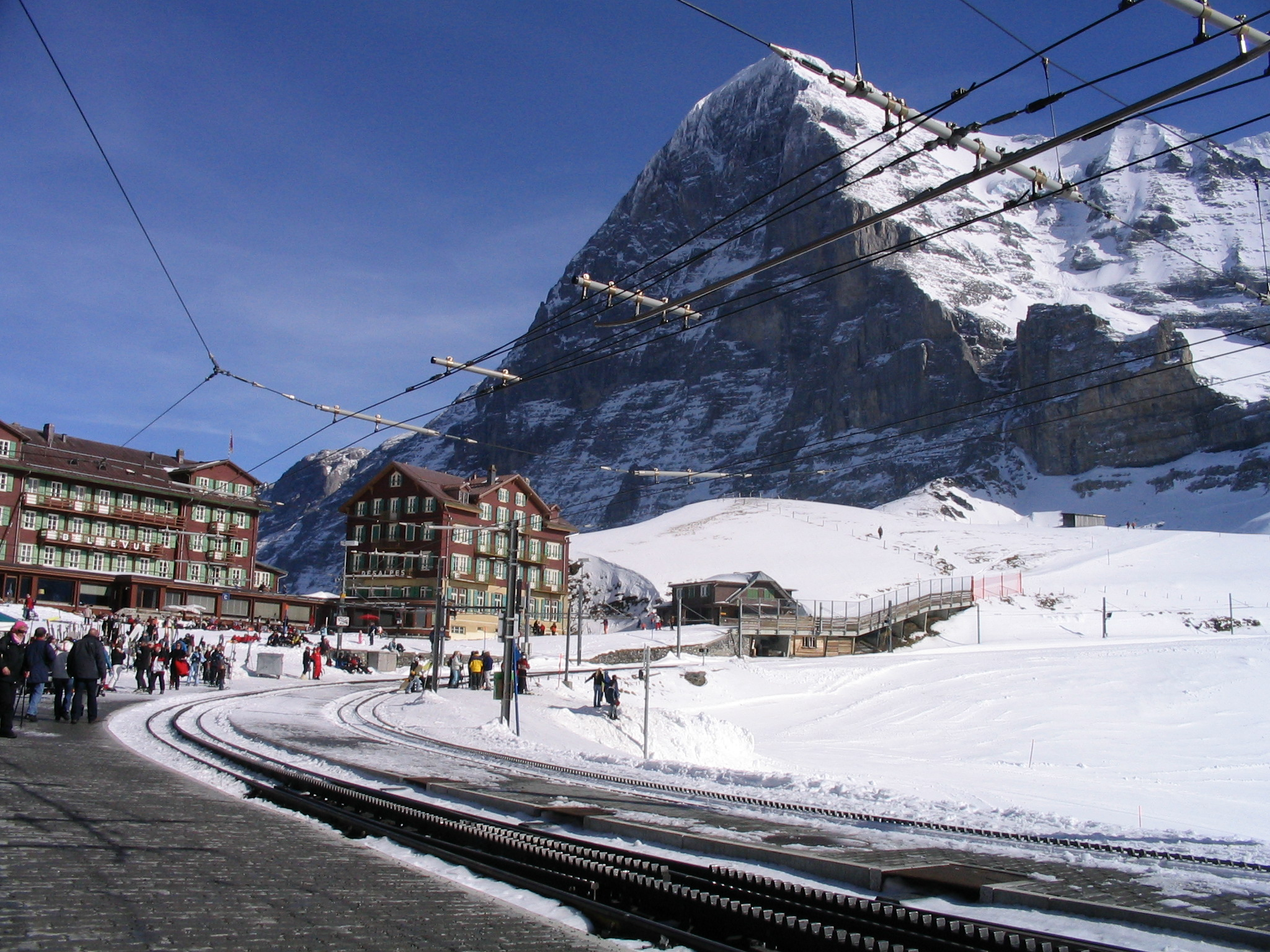 Kleine Scheidegg with the Eiger North Face in the Background.